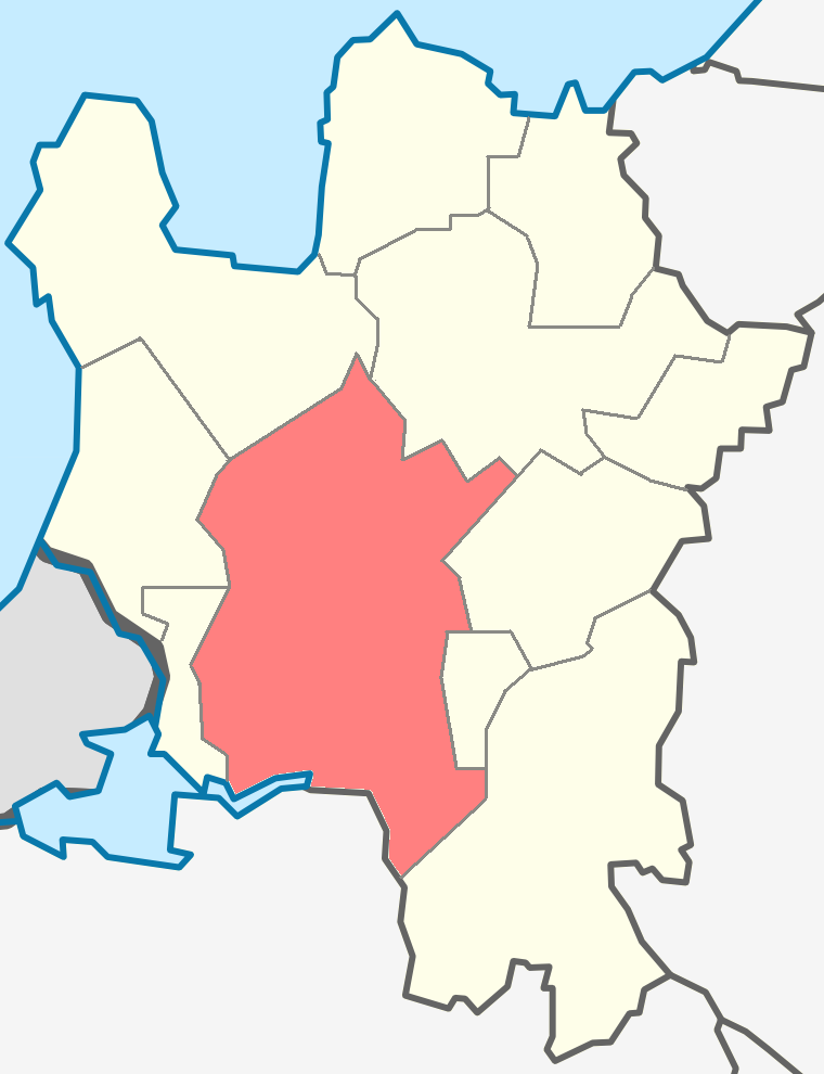 Большелуцское сельское поселение на карте Кингисеппского района